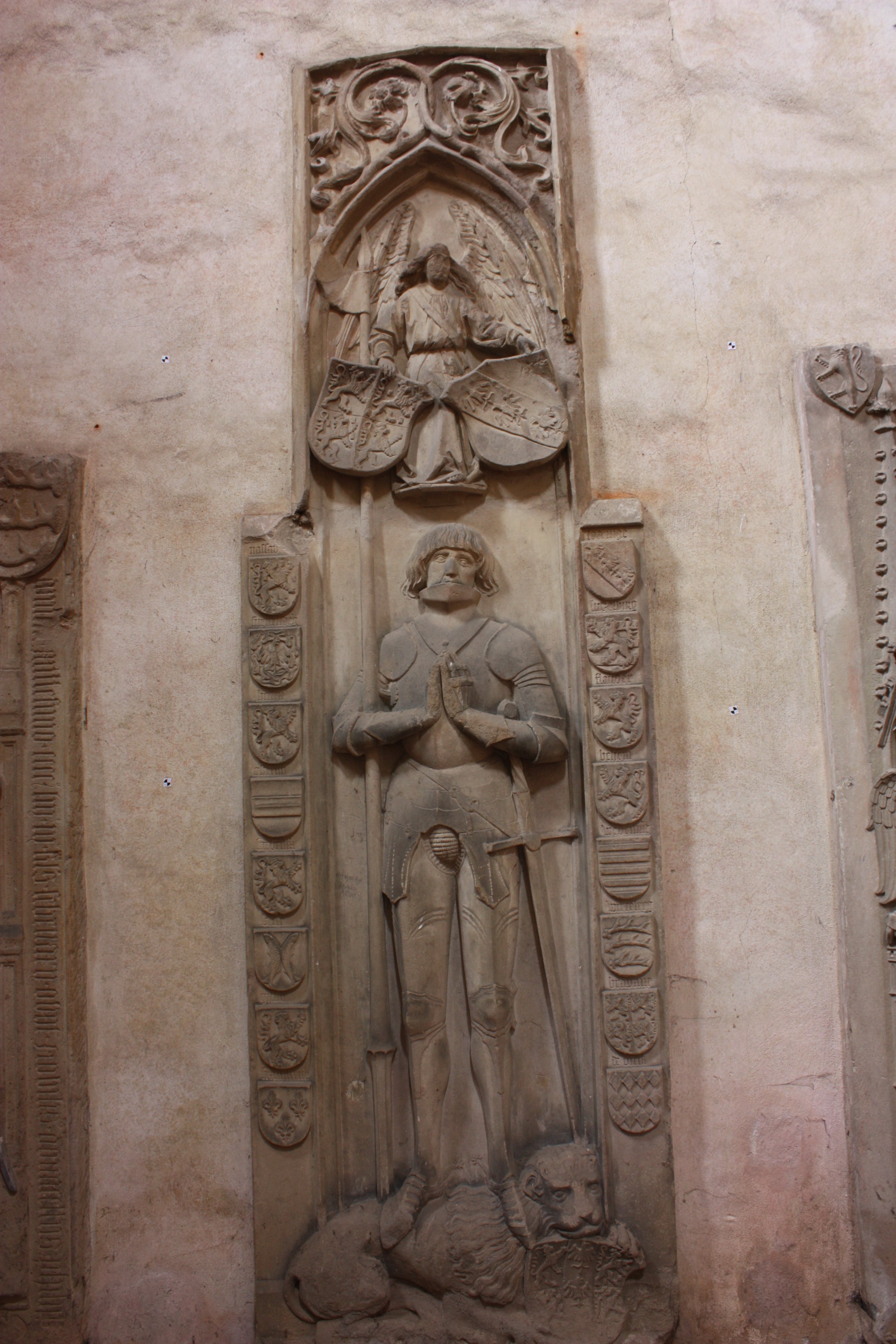 Grabplatte des Grafen Philipp II. von Nassau-Saarbrücken-Weilburg, † 1492 (Nr. 46) in der Basilika des Kloster Eberbach